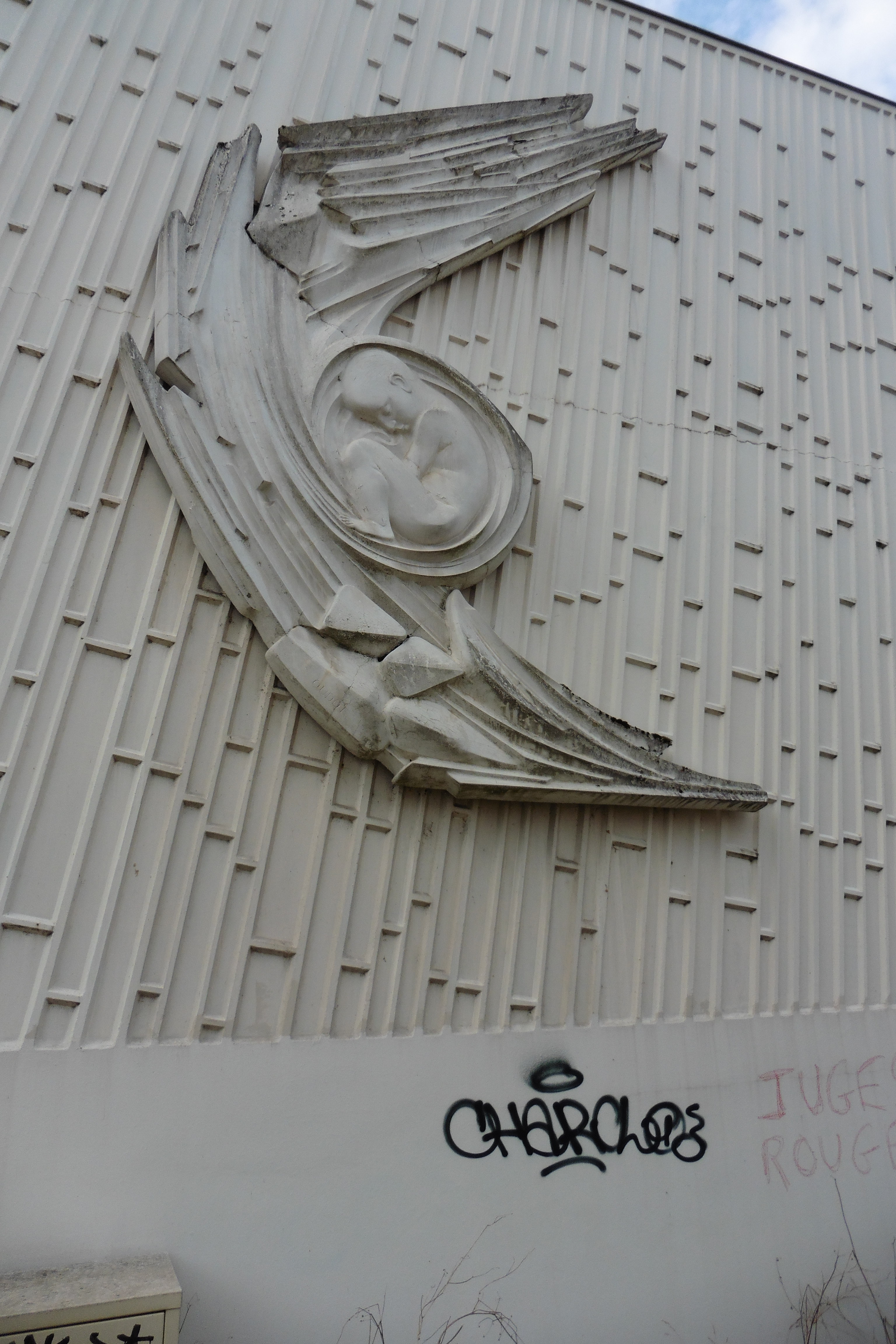 Fresque